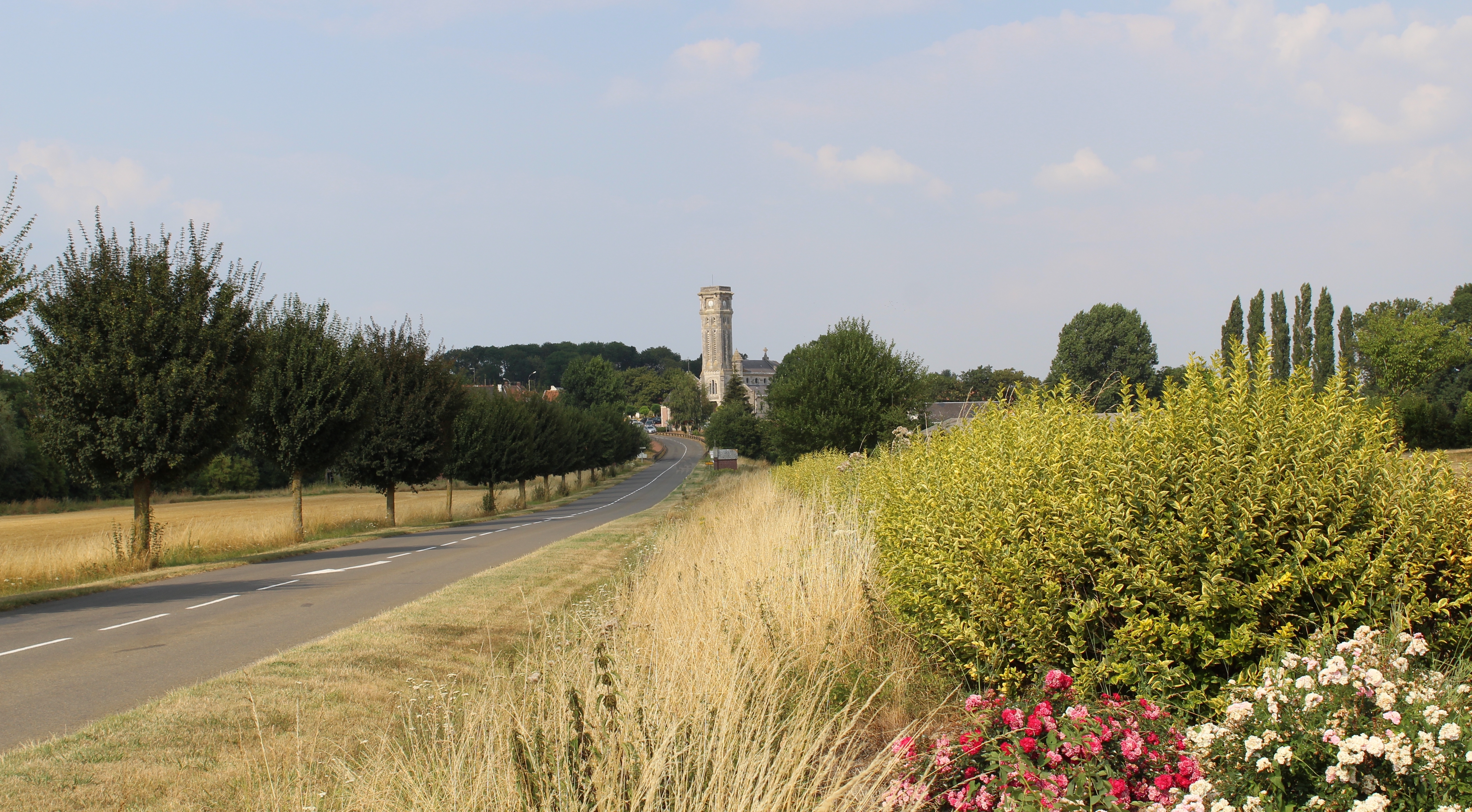 Entrée du village.